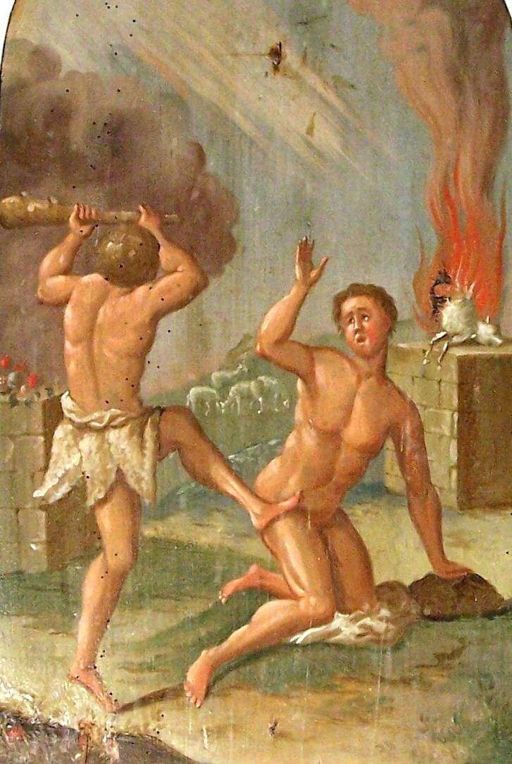 Gemälde von Ludwig Müller aus der grundhofer kirche von 1762: Kain und Abel